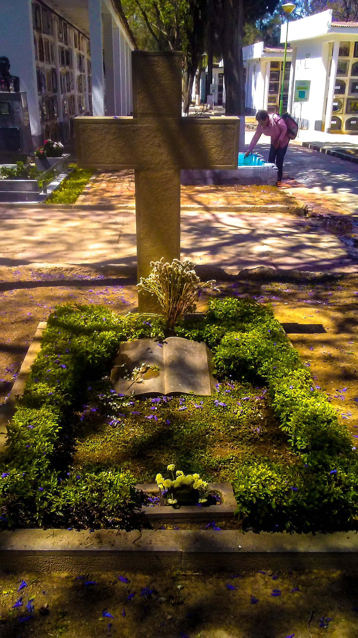 Tumba ubicada en la seccion notables del cementerio general de Cochabamba-Bolivia